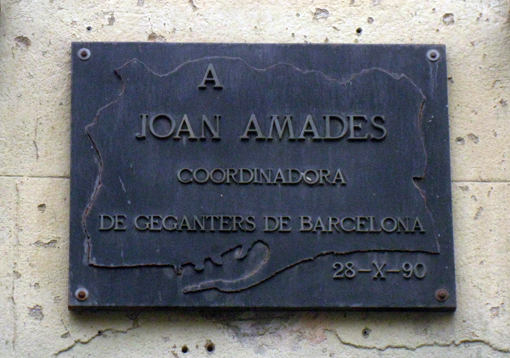 Joan Amades. Pl. Joan Amades (Barcelona) Aquesta placa va ser col·locada per la Coordinadora de Geganters de Barcelona, l'any 1990, amb motiu de la celebració del Centenari del naixement del Joan Amades